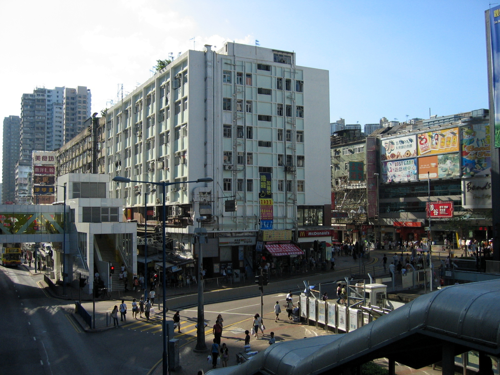 Yue Man Square 裕民坊